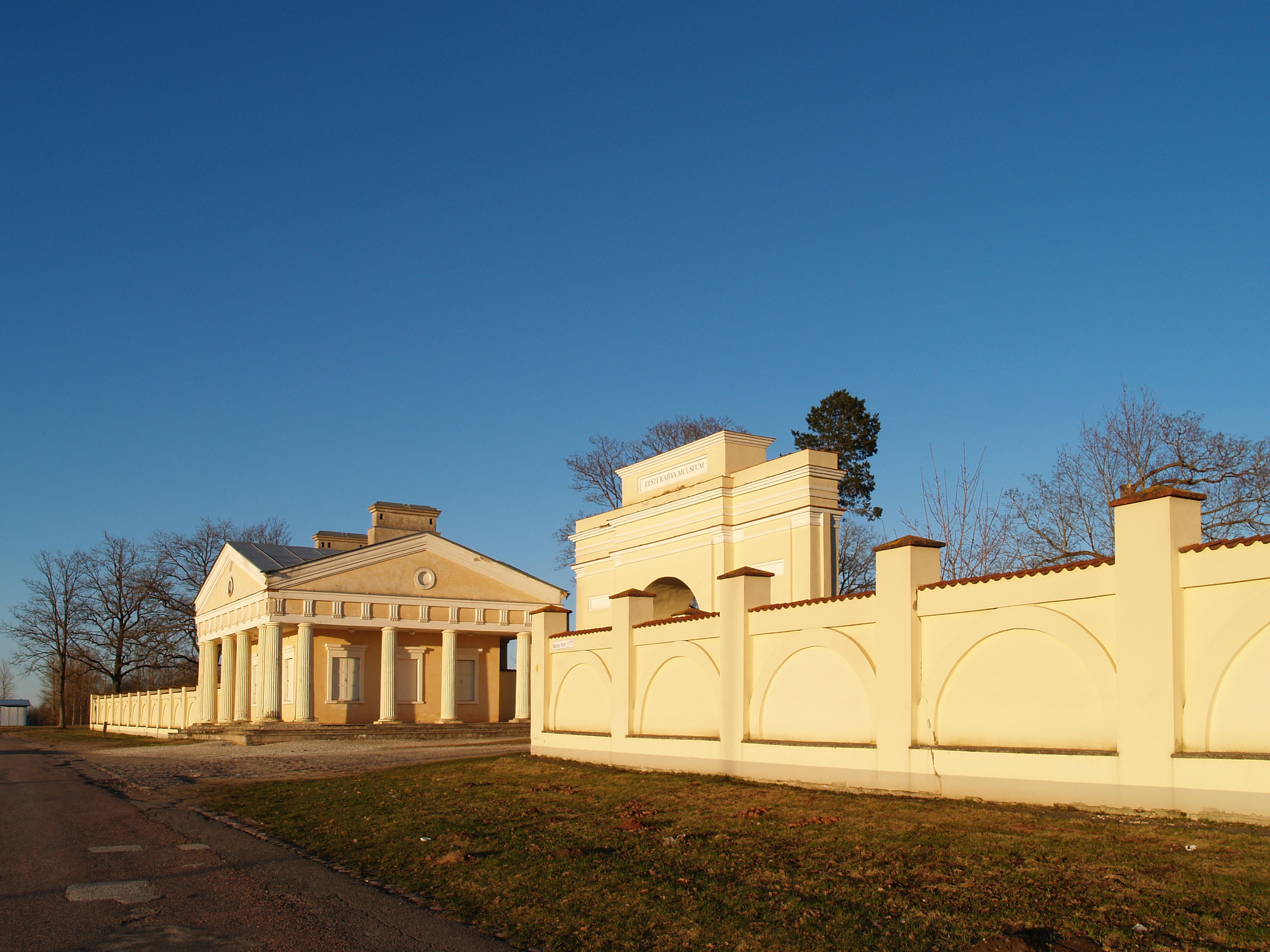 Raadi mõisa värav ja väravahoone